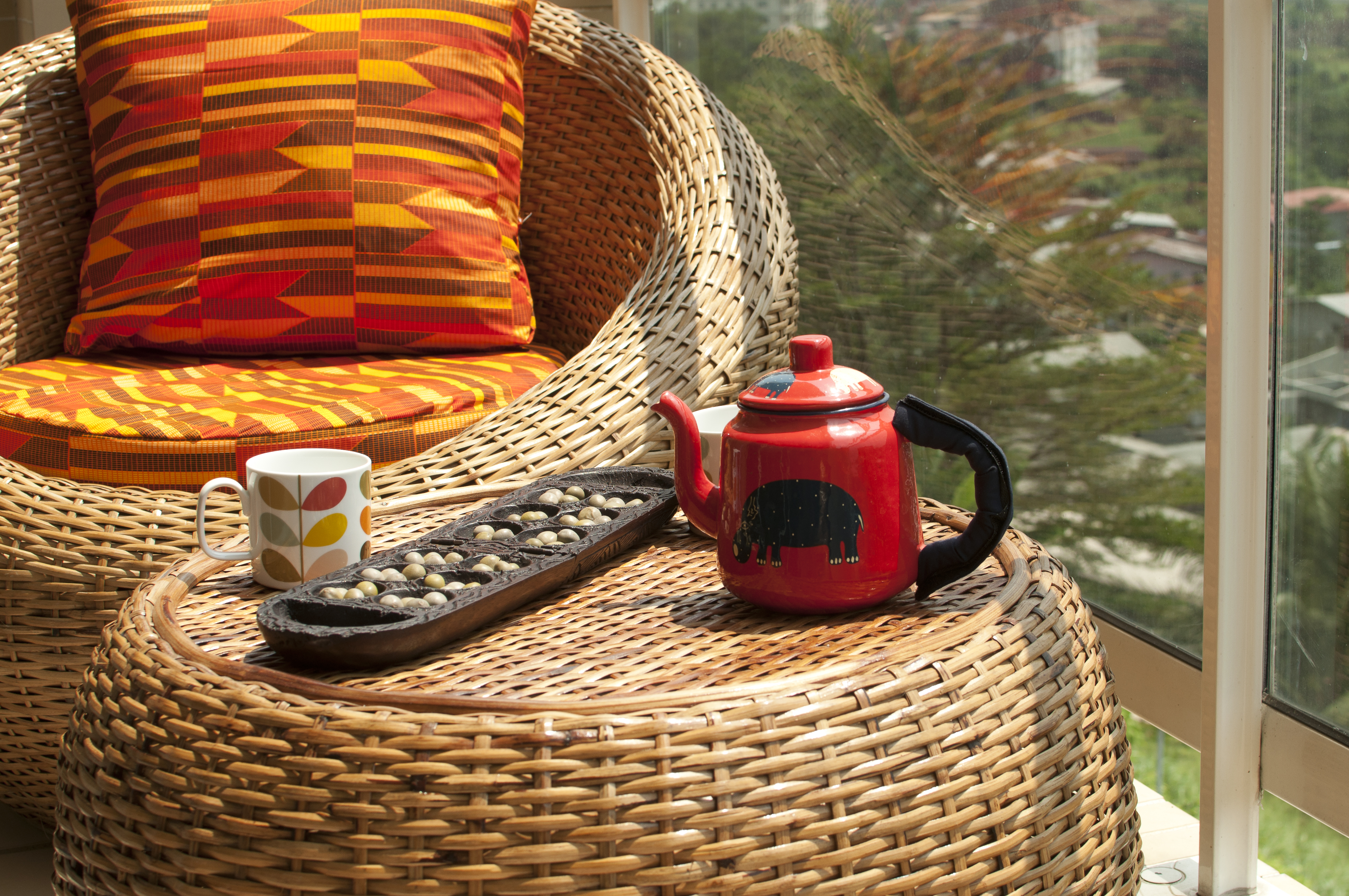 On retrouve ce jeu traditionnel africain en afrique de l'ouest comme en Afrique Centrale, Appelé Le songo chez les Éwono du Cameroun et leurs cousins du Gabon, de Guinée équatoriale et du moyen Congo, il sous-tendait autrefois une façon religieuse et mystique de vivre la vie. Et distillait auprès des joueurs et de la société une philosophie existentielle particulière. Au bénin, appelé, Adji ce jeu de société est supposé former l'esprit et éveiller l'intelligence. C'est aussi un système ludique à fond mathématique très dense, fait de calcul mentaux, de combinaisons, de réflexions et de projections. De plus, c'est un jeu de souplesse et d'agilité des doigts qui favorise le développement de la logique, de l'attention et de l'intelligence. Elle se joue parfois en présence d'un arbitre. Ce jeu se joue à deux. Une tige de bambou, palme ou raphia est latéralement divisée en son milieu en deux tranches égales, d’une longueur d’un mètre et comportant chacune 7 trous comme vous le voyez dans la démonstration . Chaque trou compte 5 pions ou grains qu’il faudra accumuler le plus possible pour être déclaré vainqueur. This is an image with the theme "Play" from: Gabon